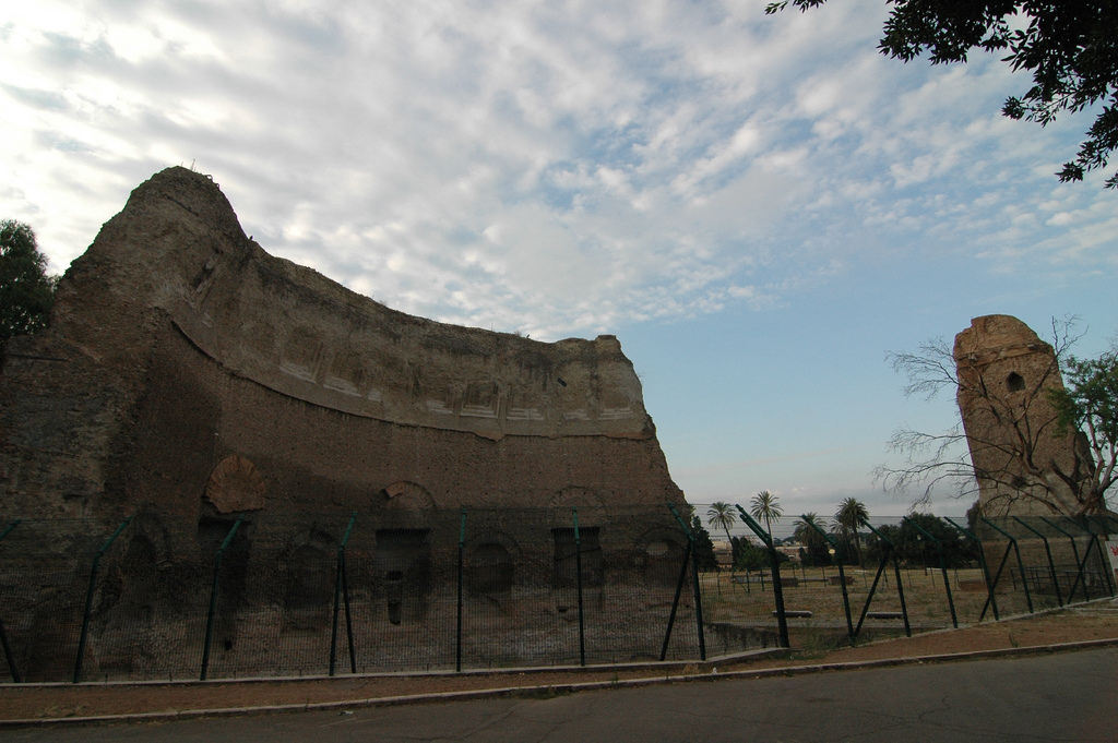 De oerbliuwsels fan de termen fan Trajanus.